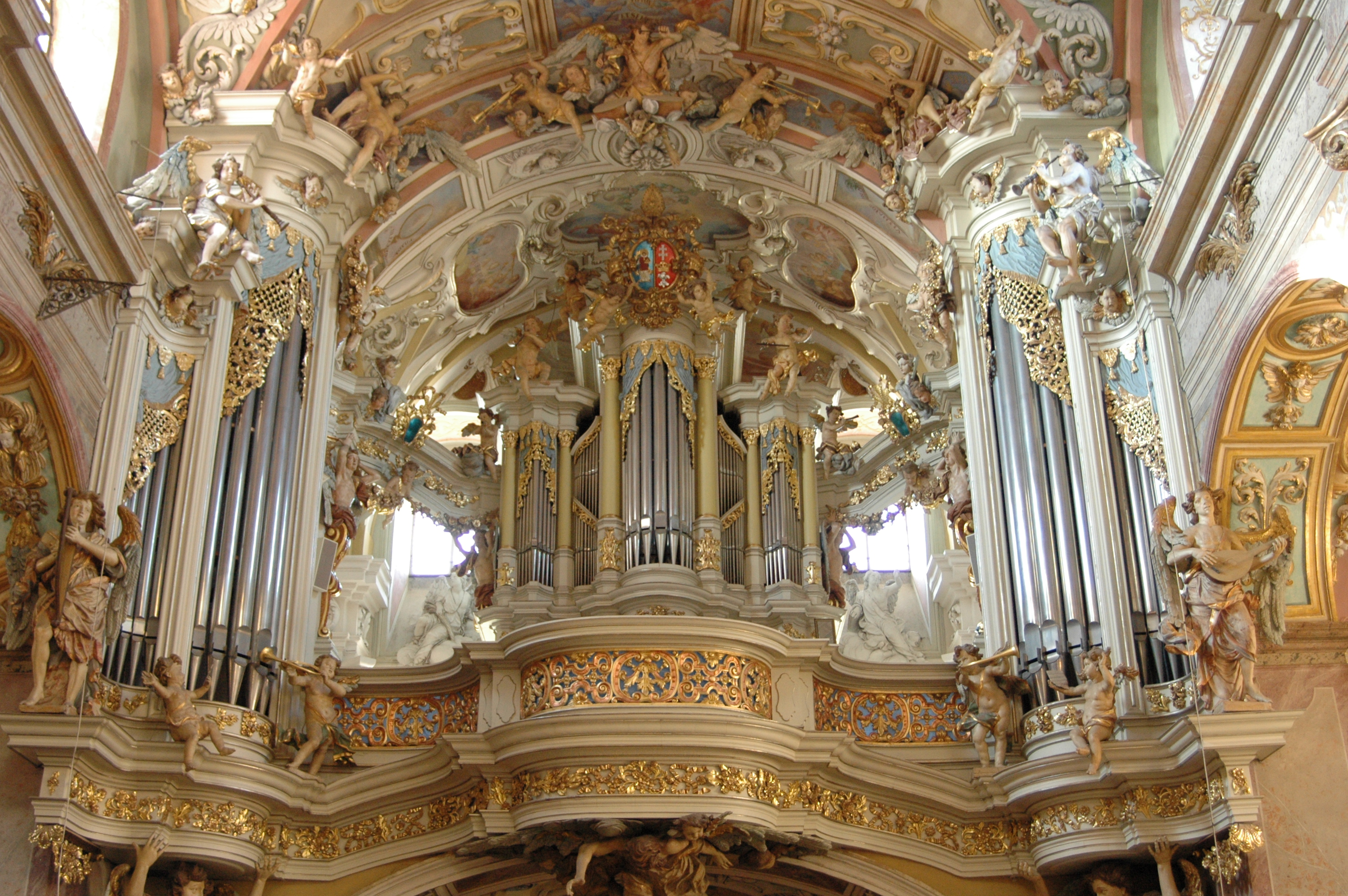 Varhany v basilice na Svatém Kopečku